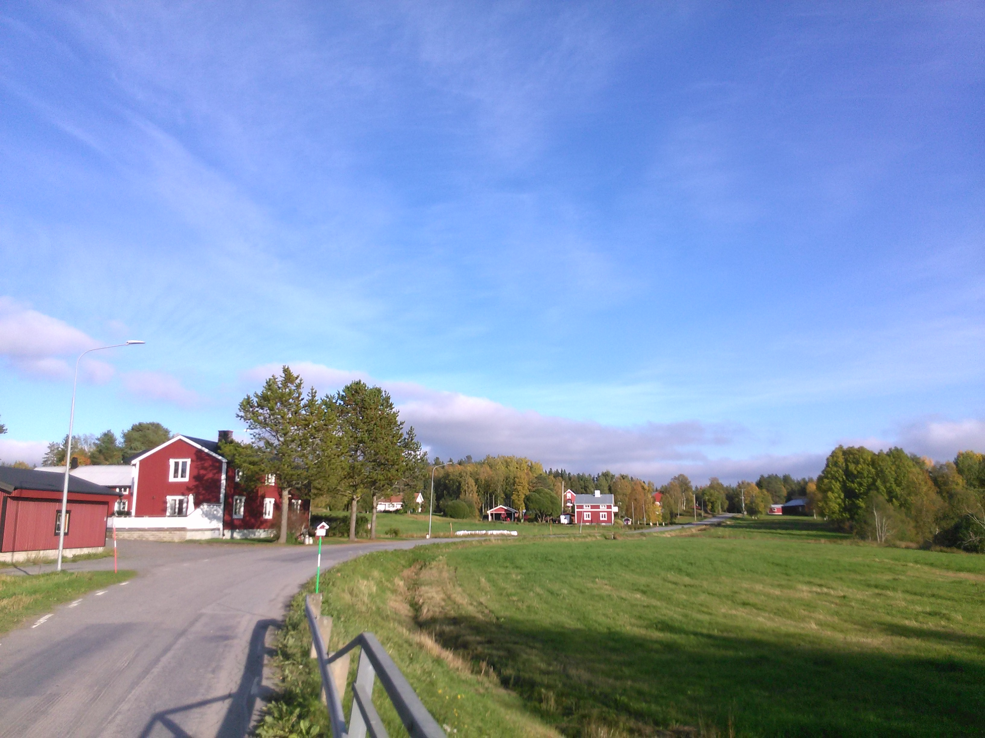 Tväråmark utanför Umeå.